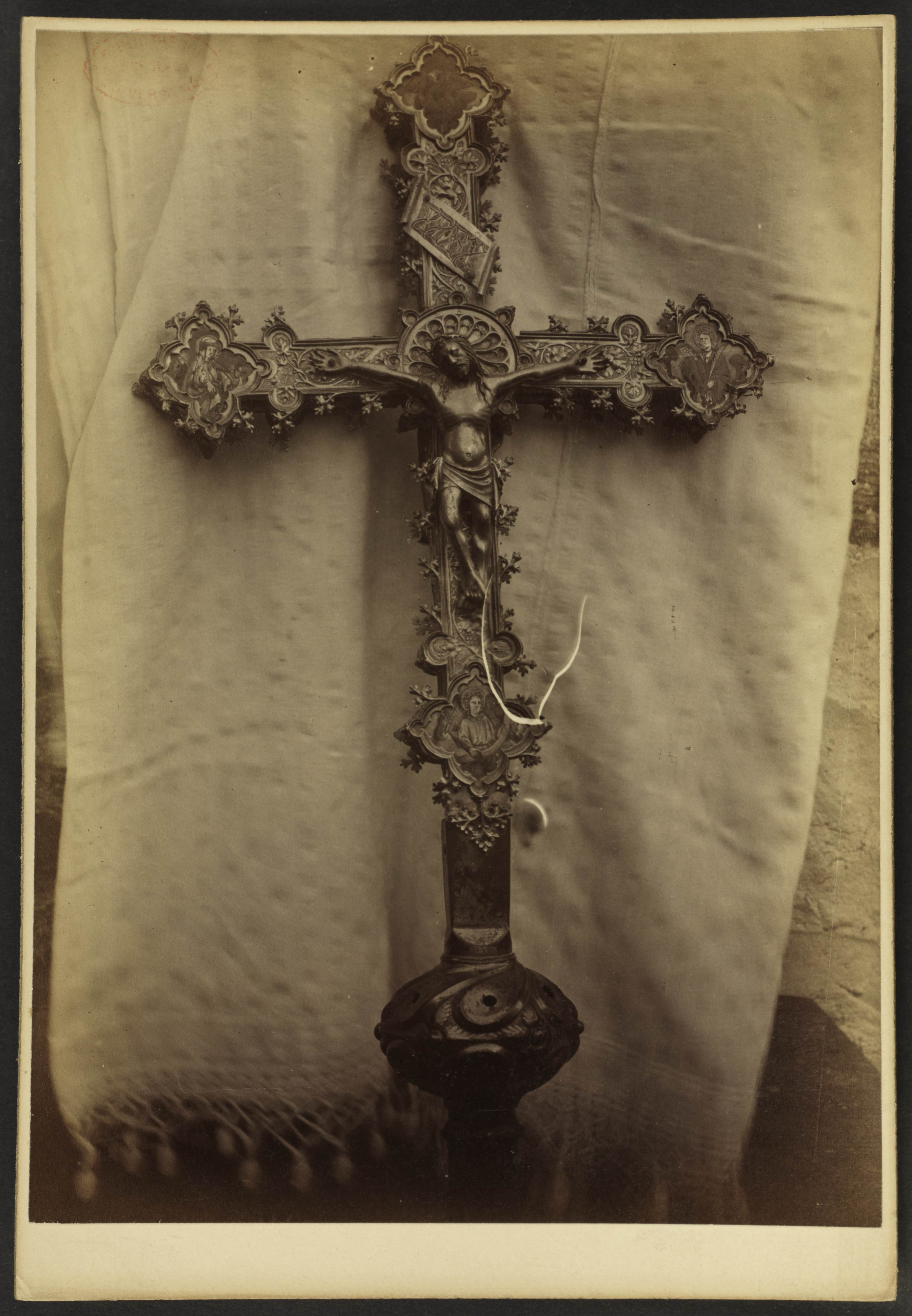 Croix processionnelle de l'église de Rigarda (Pyrénées-Orientales, France).